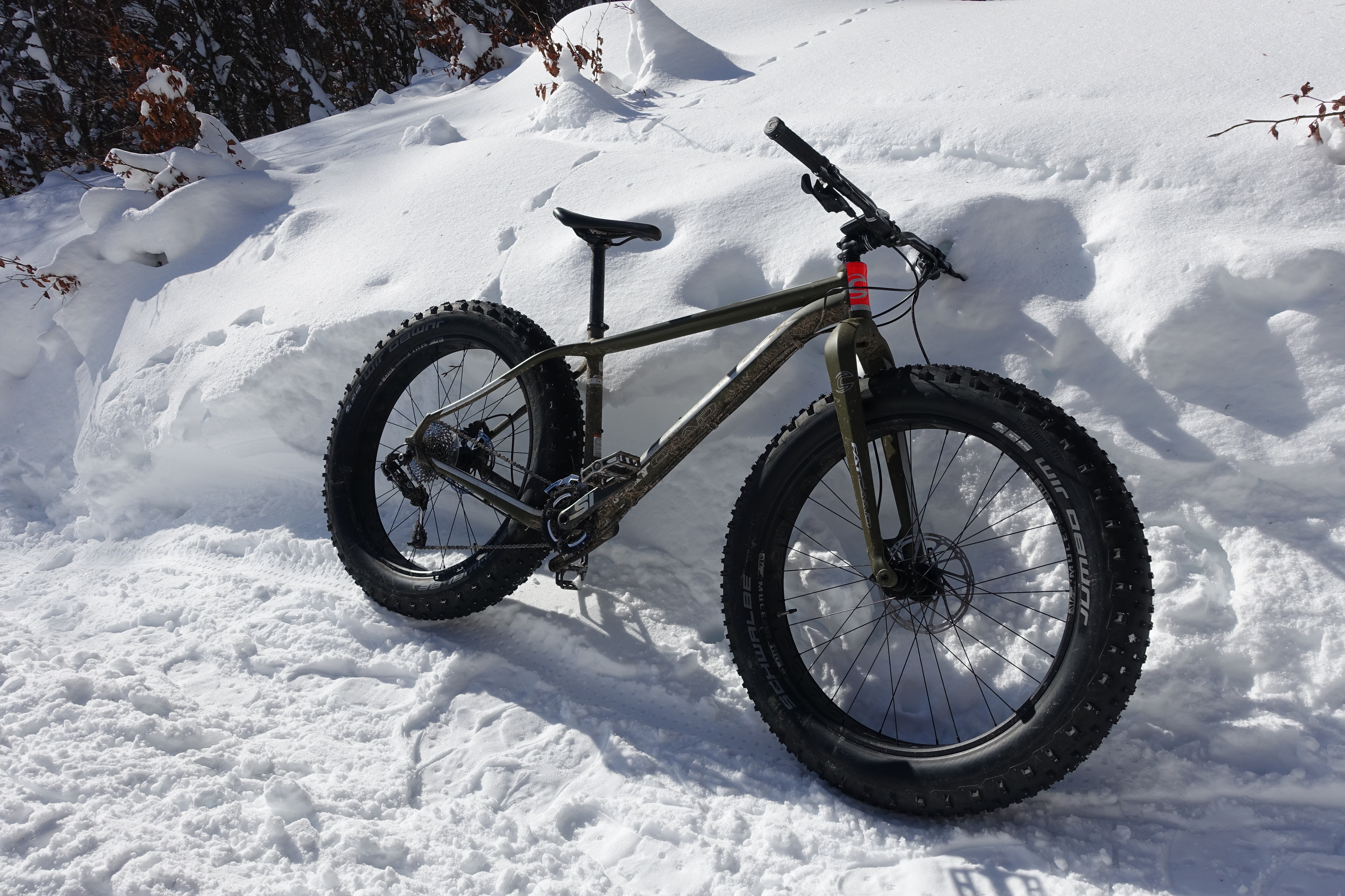 Fat bike Cannondale Caad 2 2016 au Lioran (Cantal, France)